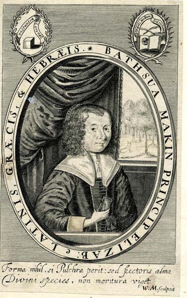 Bathsua Makin, engraving